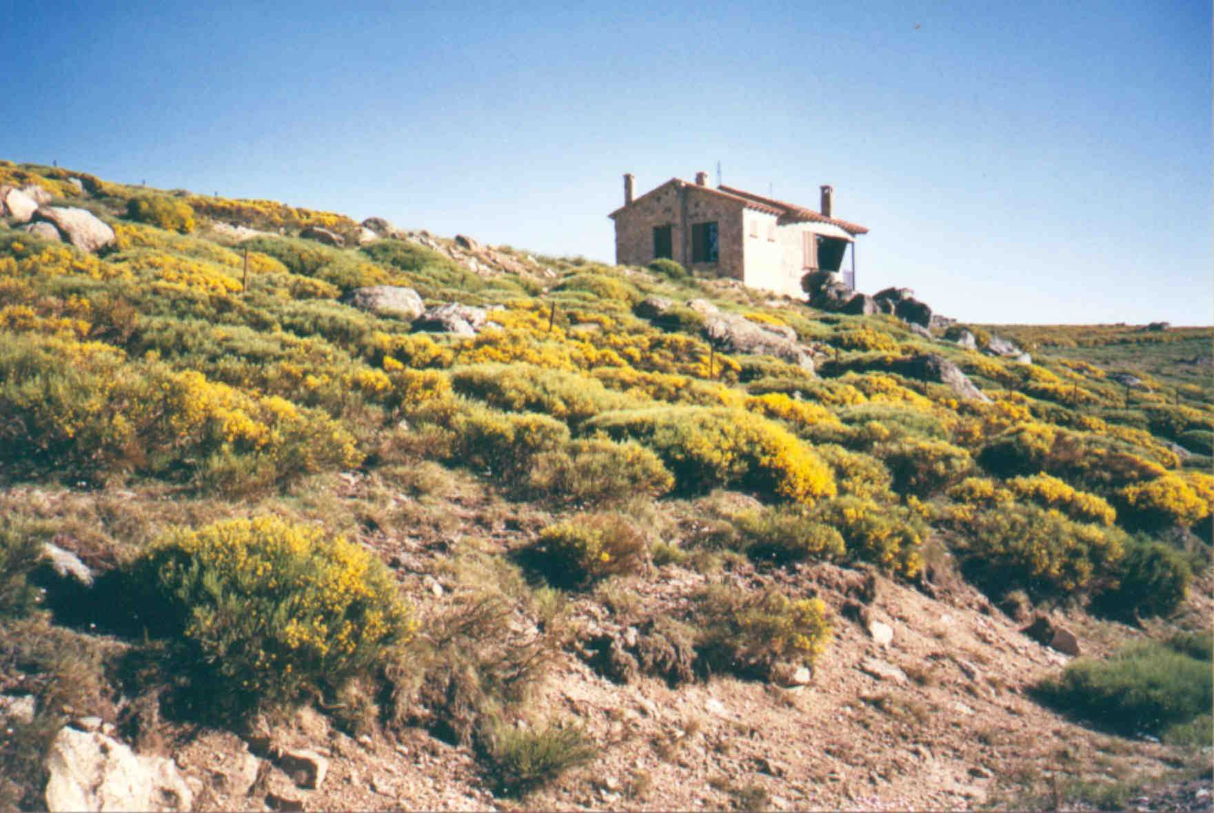 Refugio en el Puerto de Peña Negra (Sierra de Villafranca; Santiago del Collado; Ávila; España)). Autor: XXX Tiene una altitud de 1.909 metros y comunica el Valle del Corneja (Valdecorneja) con la Sierra de Gredos, cruzando la Sierra de Villafranca. Acaba en el término municipal de San Juan de Gredos, cerca de su núcleo Navacepeda de Tormes. En su recorrido solamente pasa por Pesquera (pedanía de Piedrahíta) y por la localidad de La Herguijuela. SU CIMA PERTENECE AL TÉRMINO MUNICIPAL DE SANTIAGO DEL COLLADO. Corresponde con la carretera provincial AV-932. En su vertiente norte tiene un recorrido de 13 km y un desnivel de 840 metros. En su vertiente sur tiene un recorrido de 8 km y un desnivel de 590 metros. Ascendiendo por el norte, a una altitud de unos 1.600 metros, se encuentra el enclave Monte de la Jura, donde según cuentan las crónicas fueron derrotadas las tropas musulmanas por los ejércitos cristianos, significando un hito en el posterior desarrollo de la Reconquista.